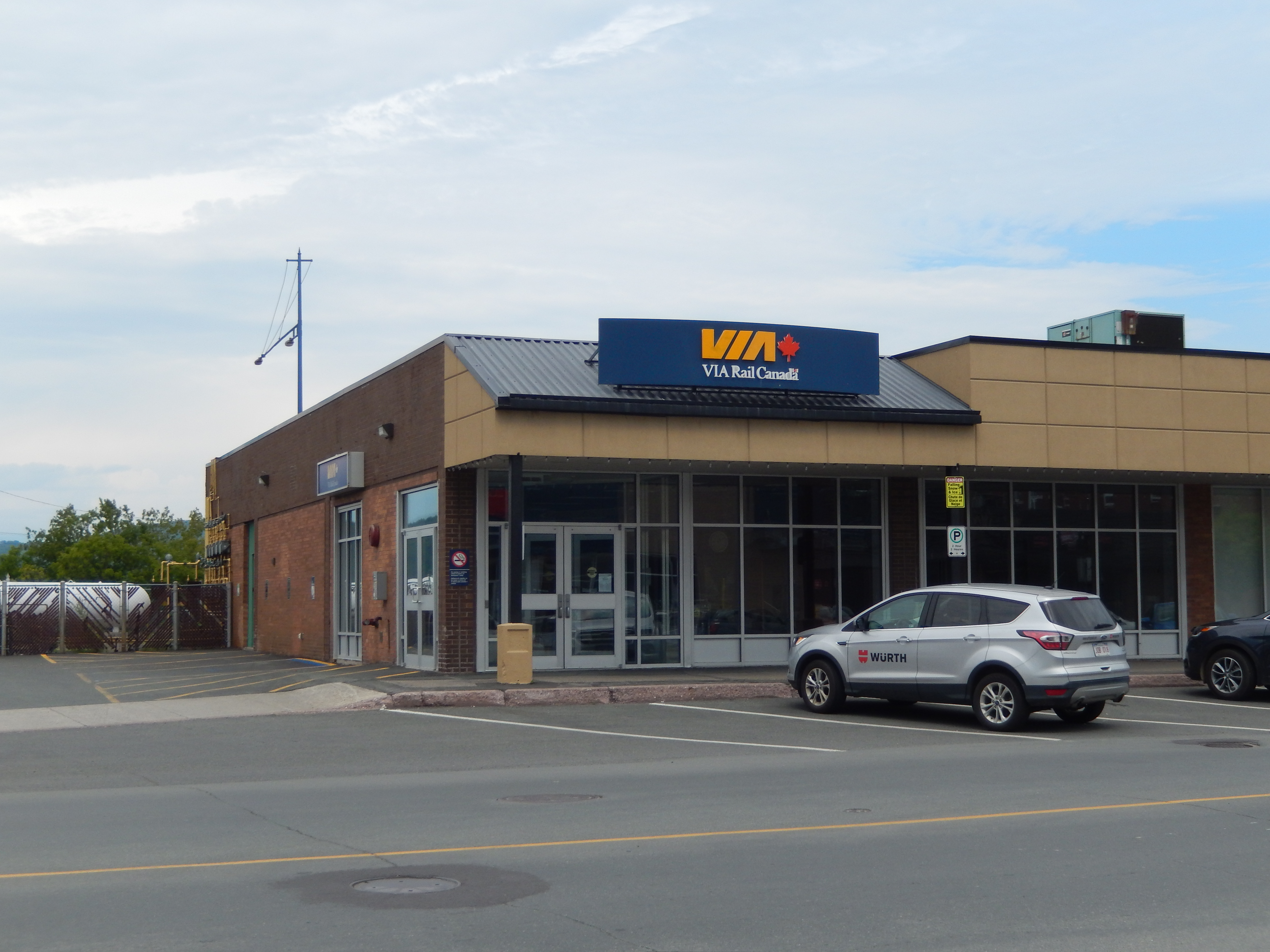 Gare de Campbellton